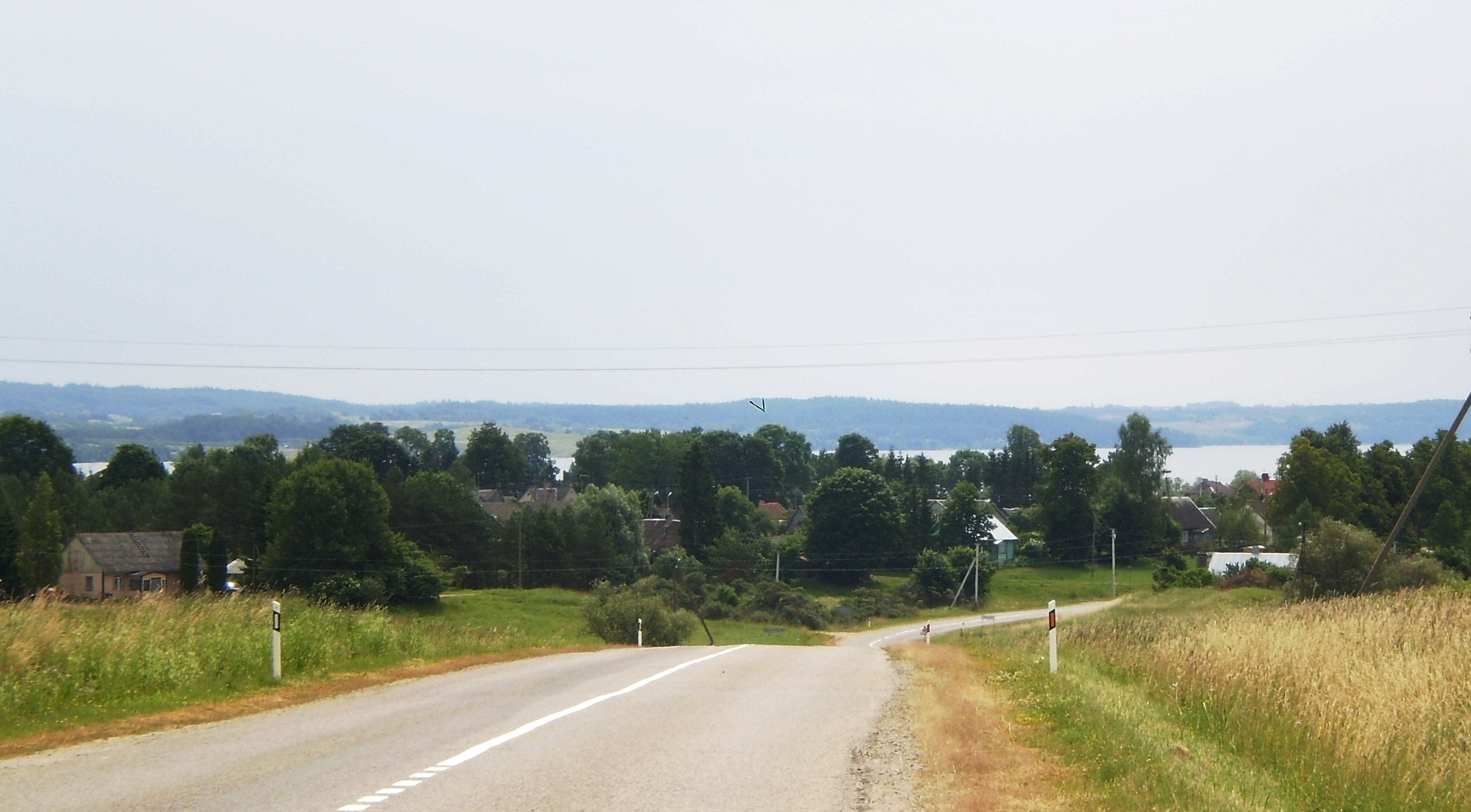 Vištytis, Vilkaviškio raj.